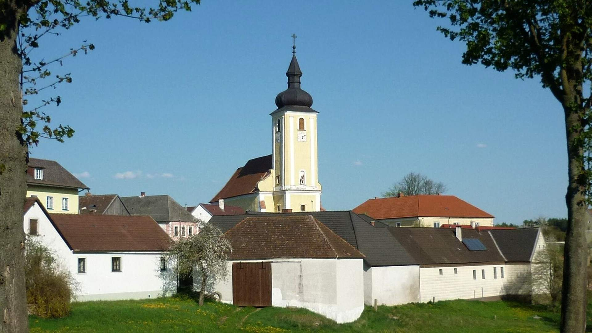 Kath. Pfarrkirche hl. Martin, Waldkirchen a. d. Thaya